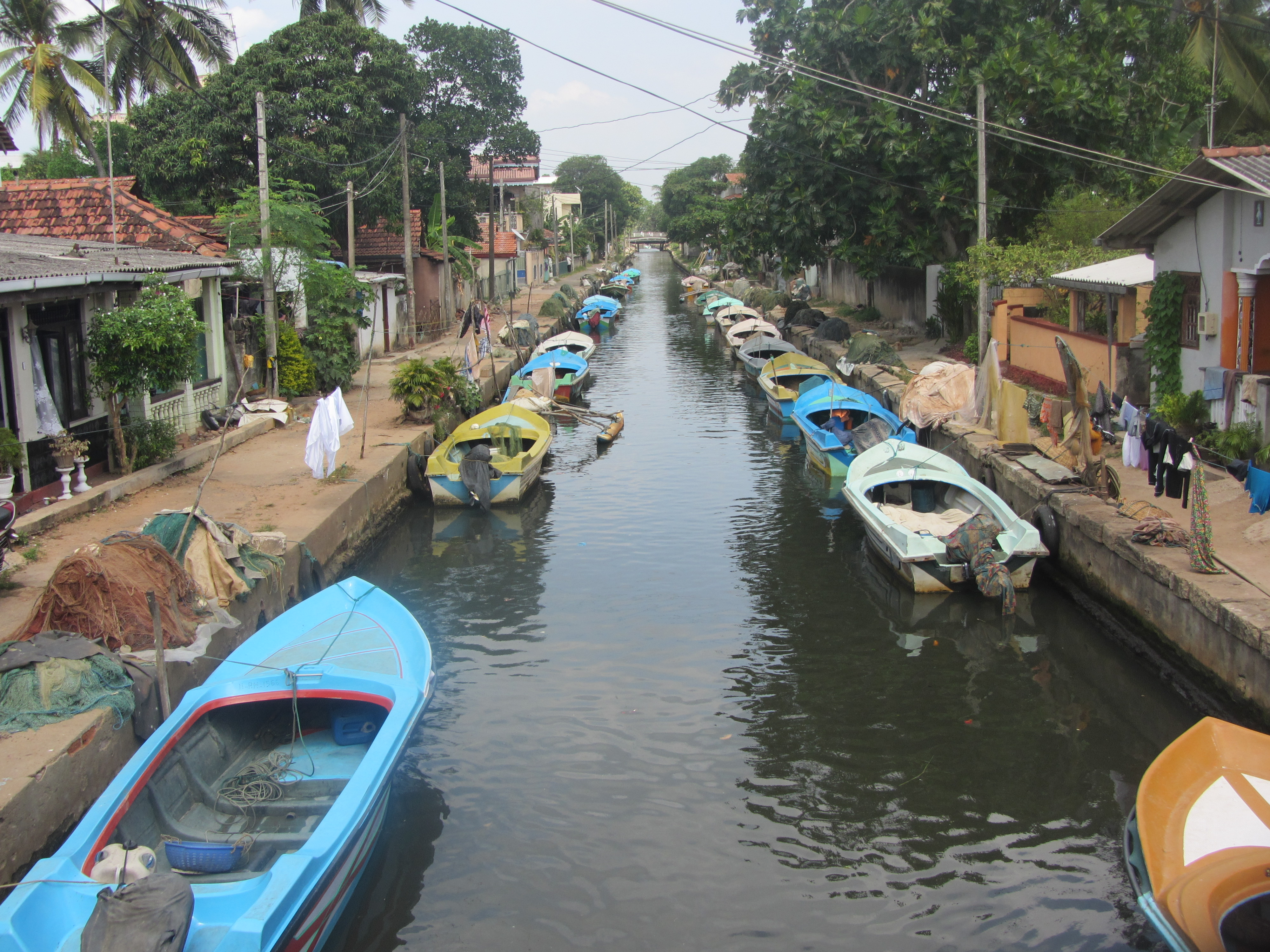 Sri Lanka Negombo Dutch Channel